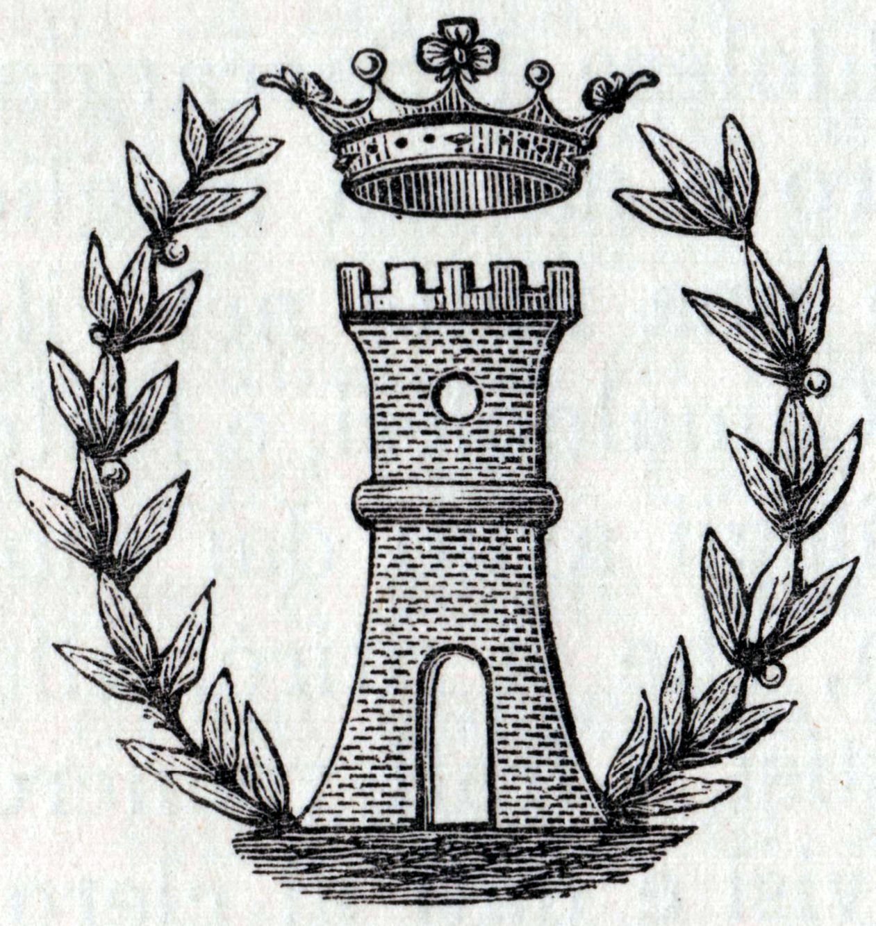 Stemma di Porto Torres, stampa del 1895 (Collezione Privata)